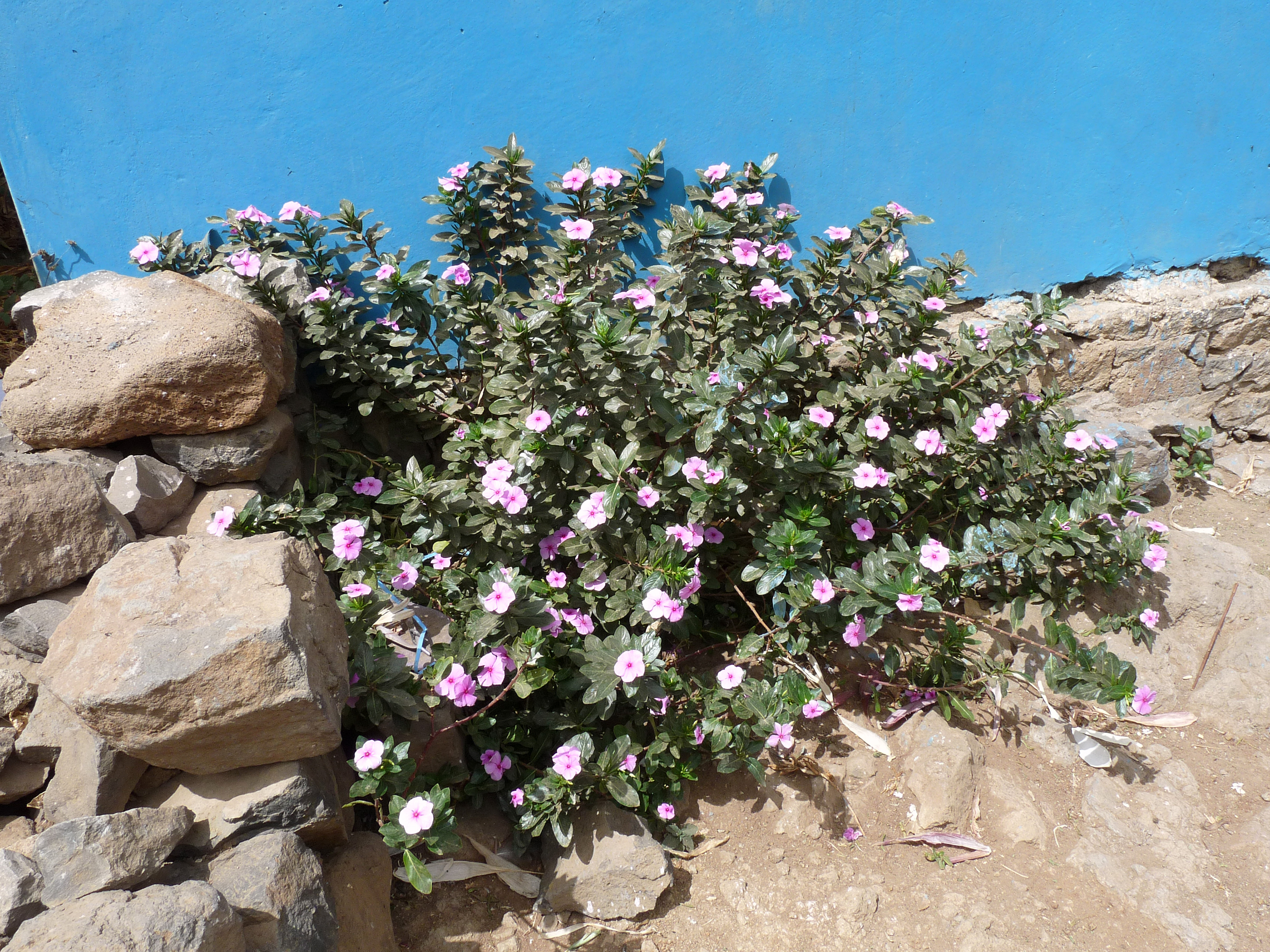 Ribeira Principal (île de Santiago, Cap-Vert) : pervenches de Madagascar